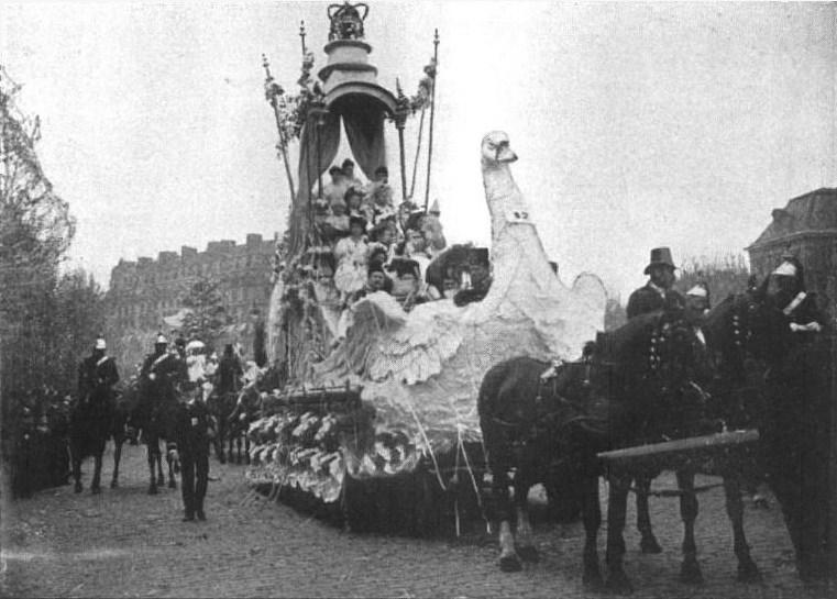 Le Char de la Reine des Reines des Marchés